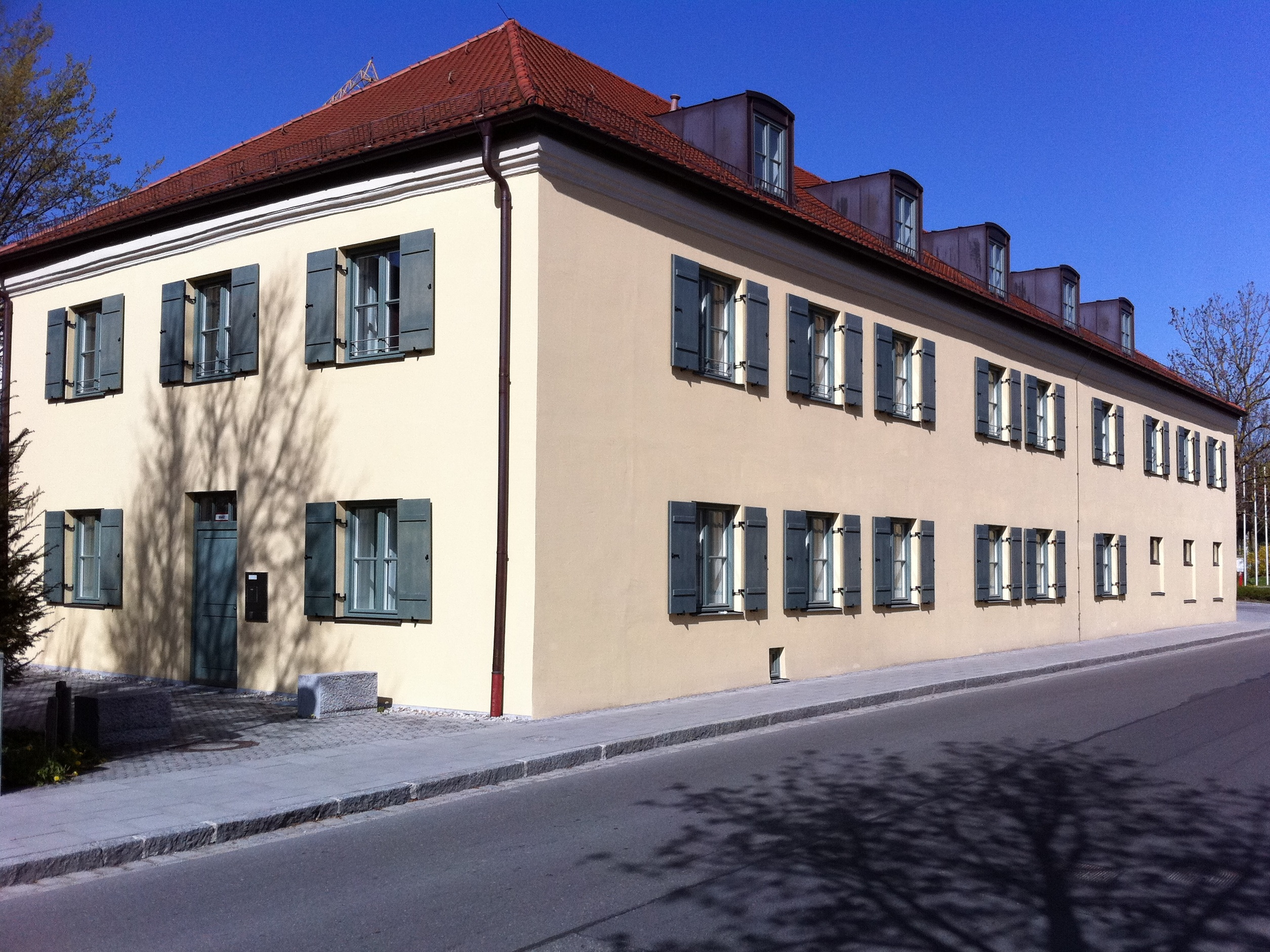 Ehemaliger Torfbahnhof in Ismaning (An der Torfbahn 3), Landkreis München, Bayern